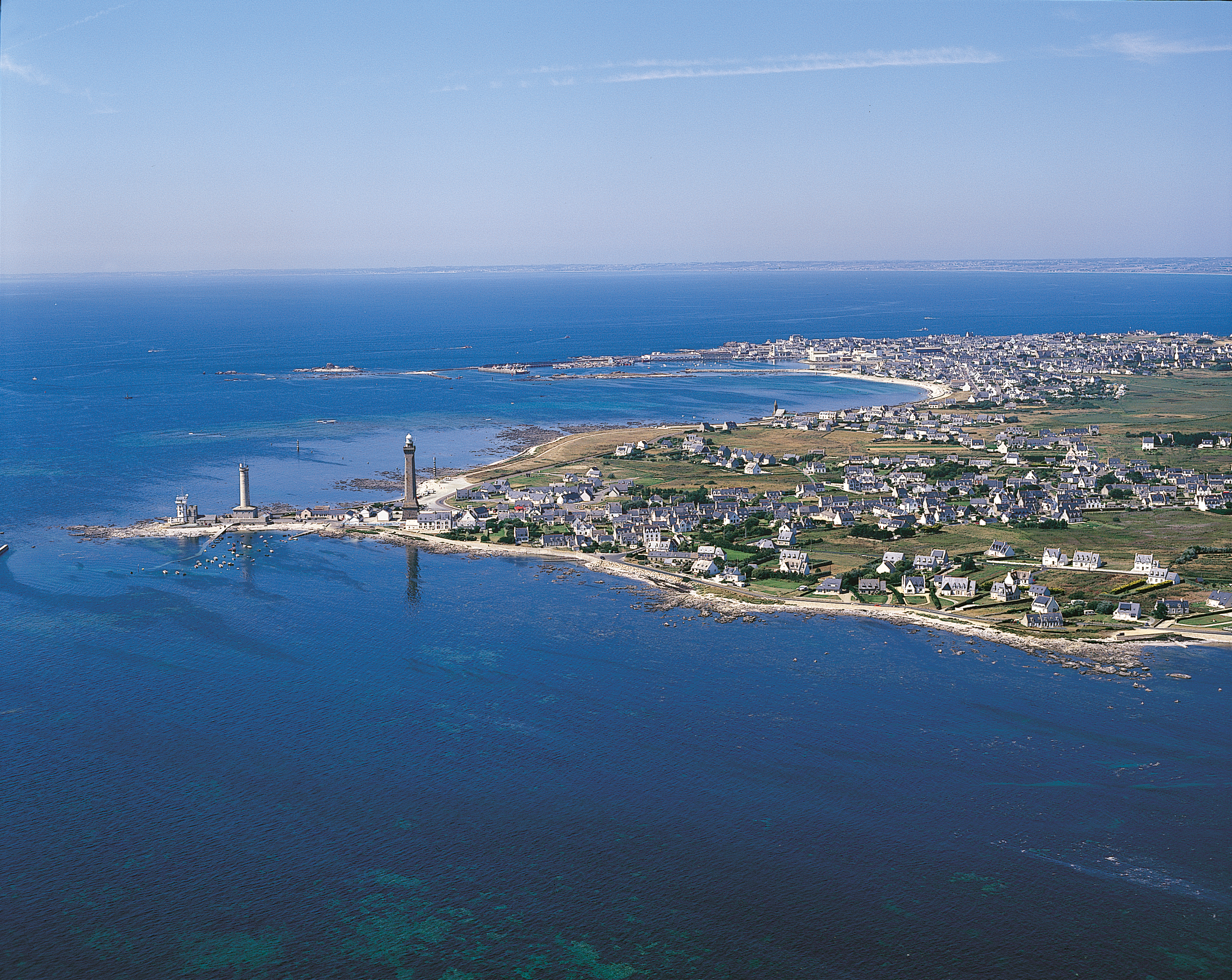 La pointe de Penmarc'h, avec le Phare d'Eckmühl